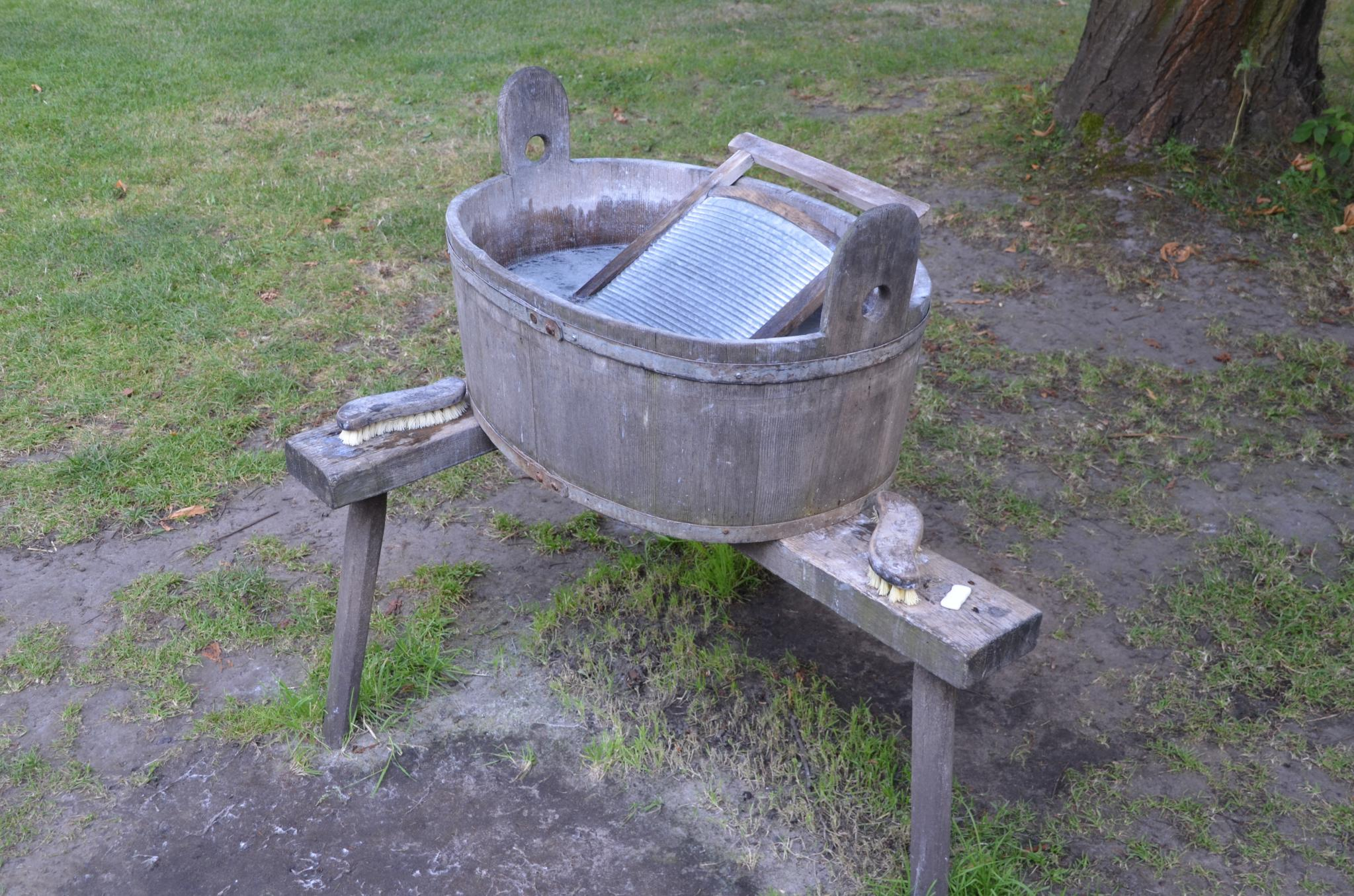 Spreewald Impressionen, Waschzuber (Zuber = Holzgefäss mit zwei Henkeln), Waschbrett und Bürsten im Freilandmuseum Lehde, Brandenburg, Deutschland.